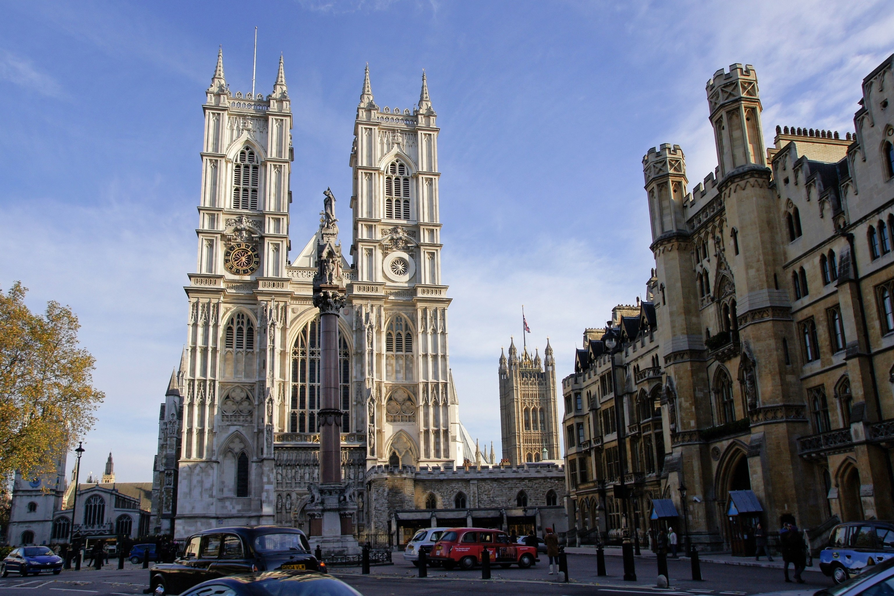 L'église de Westminster à Londres